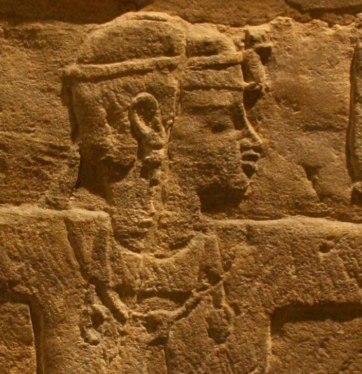 Barkenuntersatz des Natakamani und der Amanitore aus Wad Ban Naga (heute: Ägyptisches Museum Berlin, Inv. Nr. 7261)